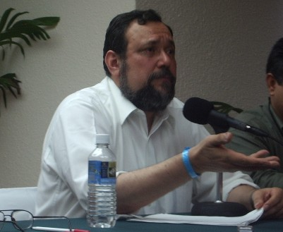 Mauricio Beuchot